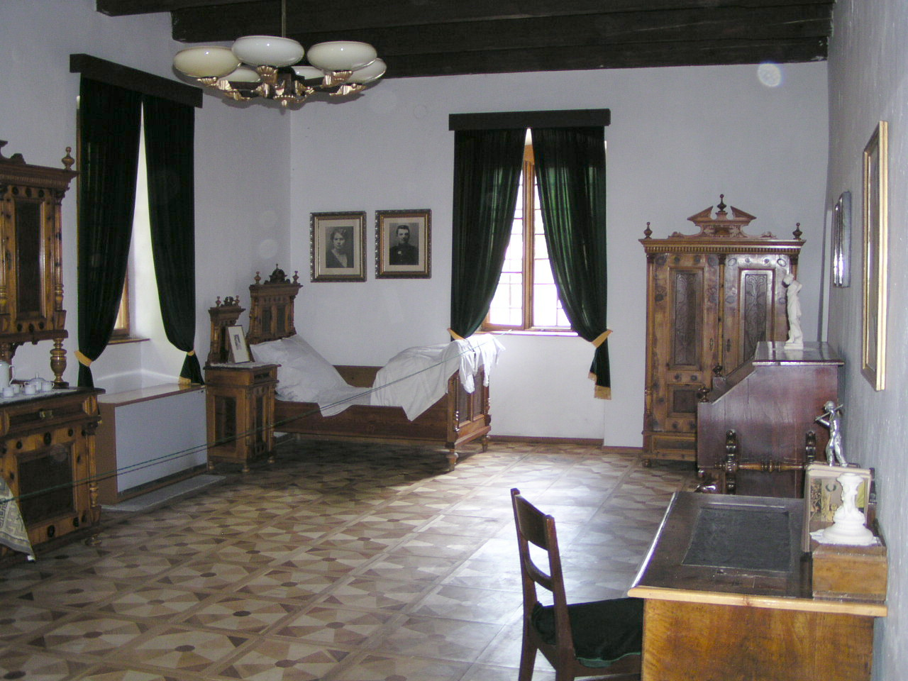 Kaštieľ Radoľa. Pohľad do expozície meštianskych interiérov na Kysuciach. 2. nadzemné podlažie kaštieľa.